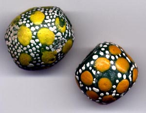 Perle di vetro della tribù Krobo " Ghana " Autore: Antonio Vecchiarelli Source URL Licenza GFDL